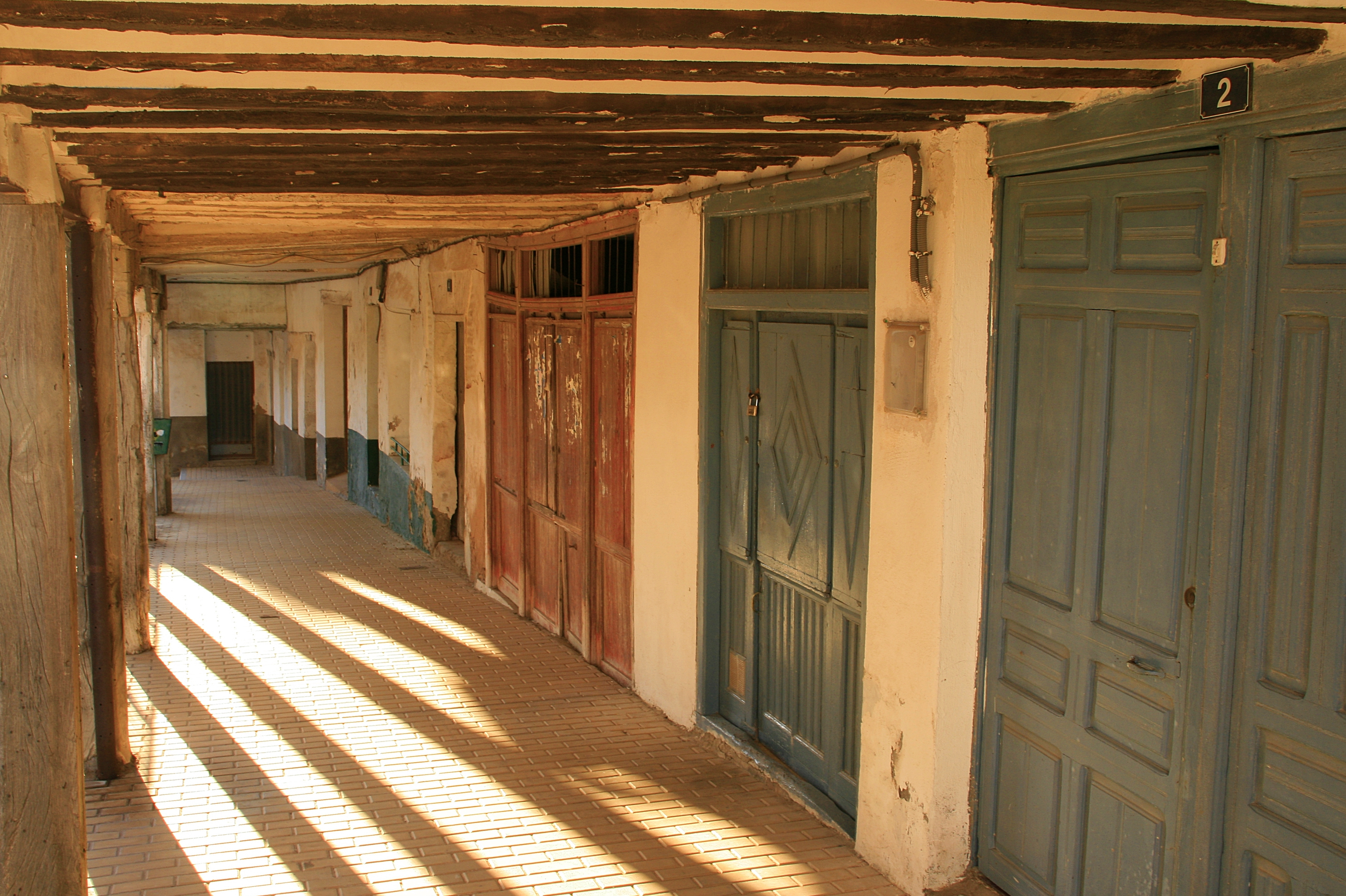 Soportales.Gomara.Soria.